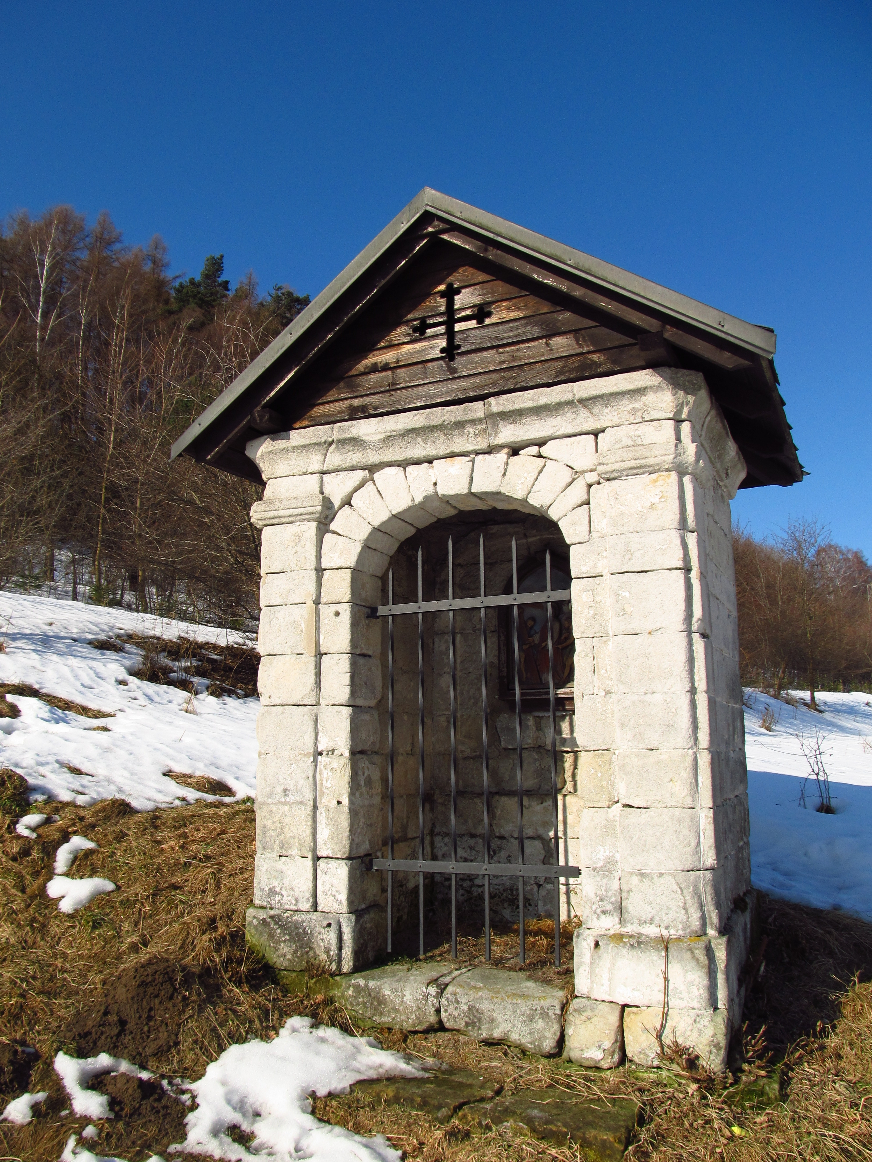 Křížová cesta Kalvárie s kaplí (Hodkovice nad Mohelkou), Hodkovice nad Mohelkou